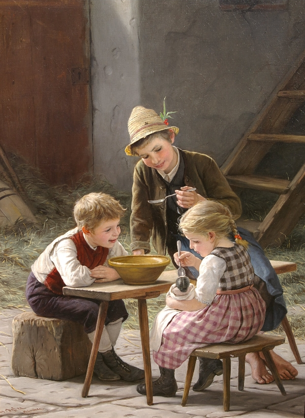 Kinder